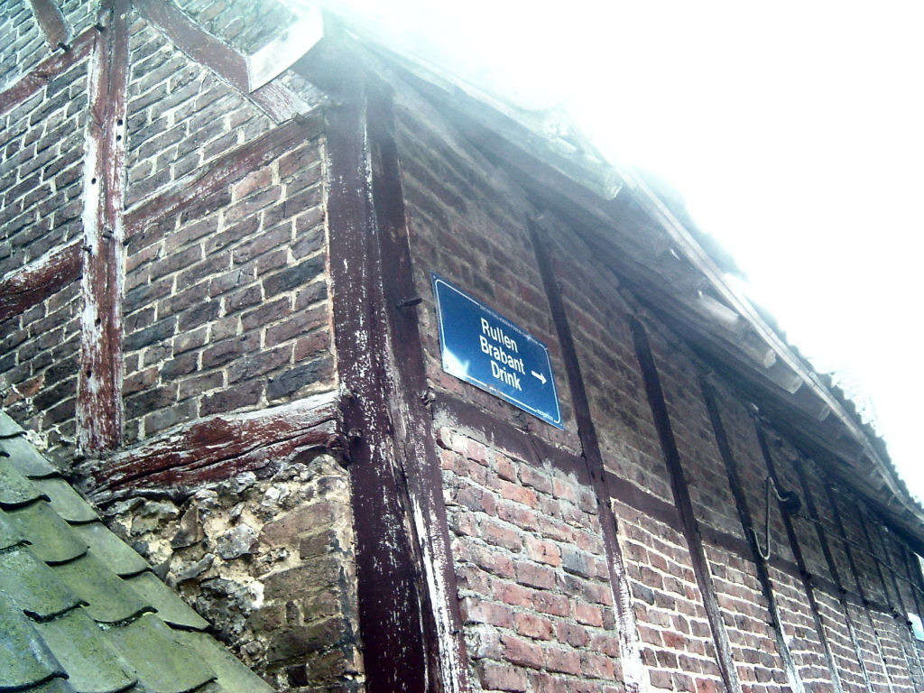 Limburgs: Aanwiesbord in Zjwaan (Swaan) in de gemeinte Voere foto: Els Diederen 2006 Aelske